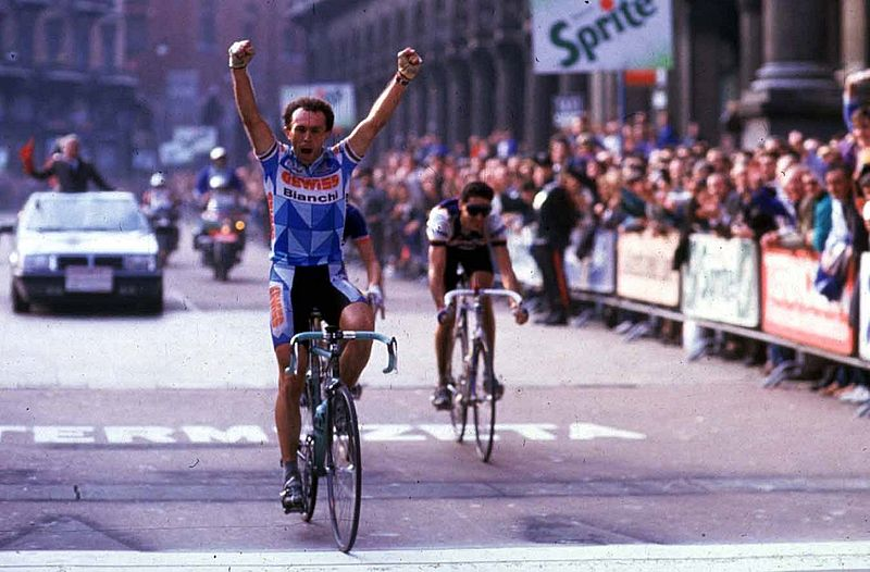 Milano, 17 ottobre 1987. Il ciclista Moreno Argentin solleva le braccia al cielo sul traguardo di piazza del Duomo al termine del vittorioso Giro di Lombardia 1987.